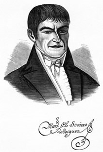 Retrato de Manuel del Socorro Rodríguez, uno de los primeros bibliotecarios de la Biblioteca Nacional de Colombia, en esa época creada bajo el nombre de Real Biblioteca Pública de Santafé. Pionero del periodismo en Colombia